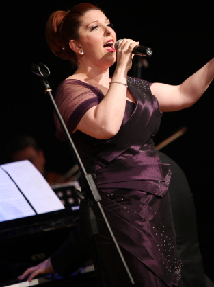 Demet Tuncer